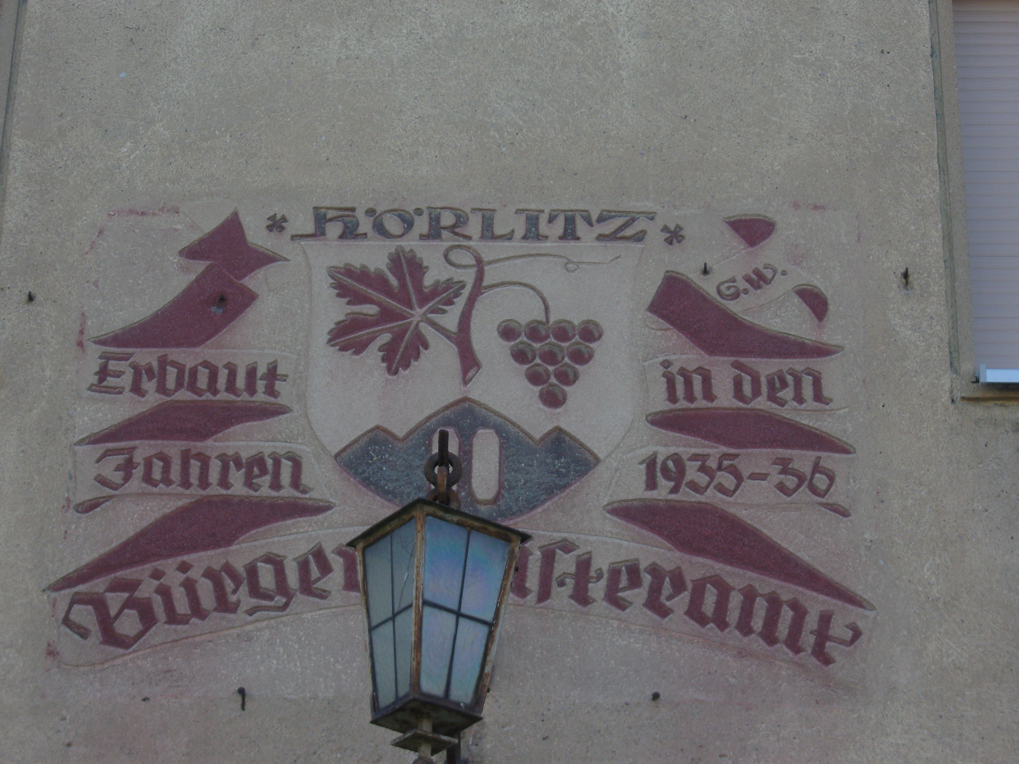 ehemaliges Wappen von Hörlitz (heute Amt Schipkau) am Bürgermeisterhaus in Hörlitz, dargestellt ist eine Weinrebe mit Weintraube auf einem Weinberg